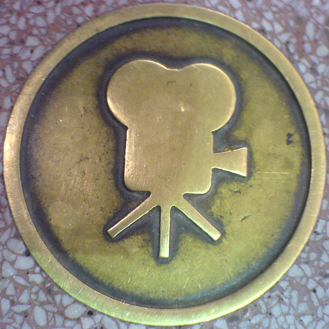 Symbol der Kategorie Film (motion pictures) der Sterne auf dem Hollywood Walk of Fame.